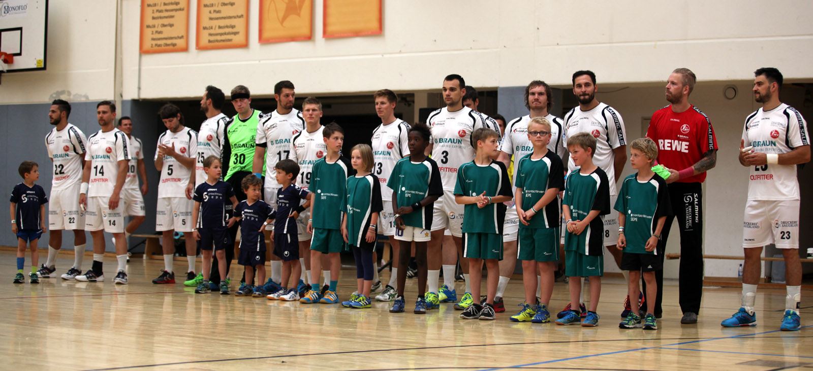 Die Mannschaft der MT Melsungen im Juli 2015 mit Auflaufkindern. Fotografiert am 14. Juli 2015 in der Heppenheimer Nibelungenhalle beim Maisch Cup.